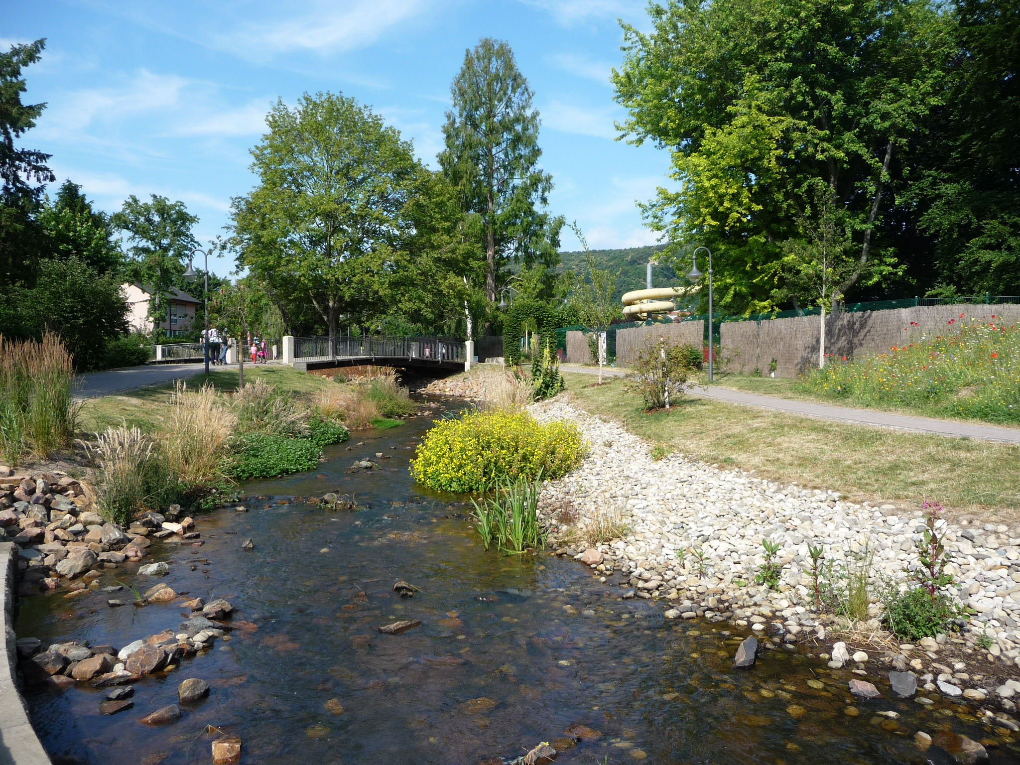 Isenach in Bad Duerkheim